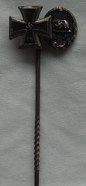 Anstecknadel mit dem Eisernen Kreuz und dem Verwundetenabzeichen